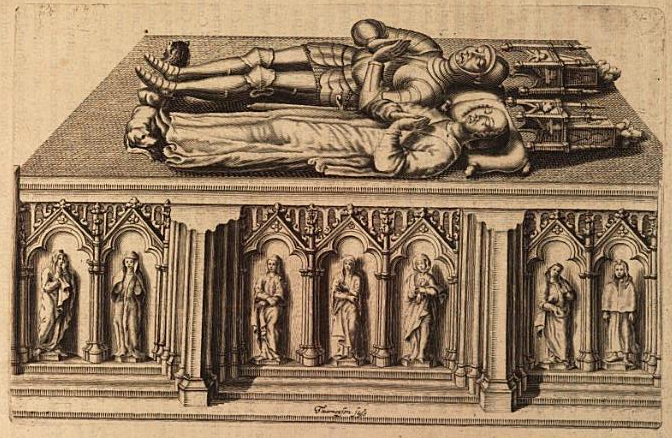 Aymon Savojský s manželkou